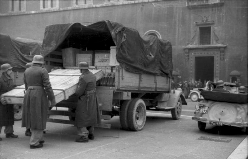 Information added by Wikimedia users.Soldati tedeschi scaricano un quadro imballato da un camion di fronte a Palazzo Venezia a Roma, nel 1943.